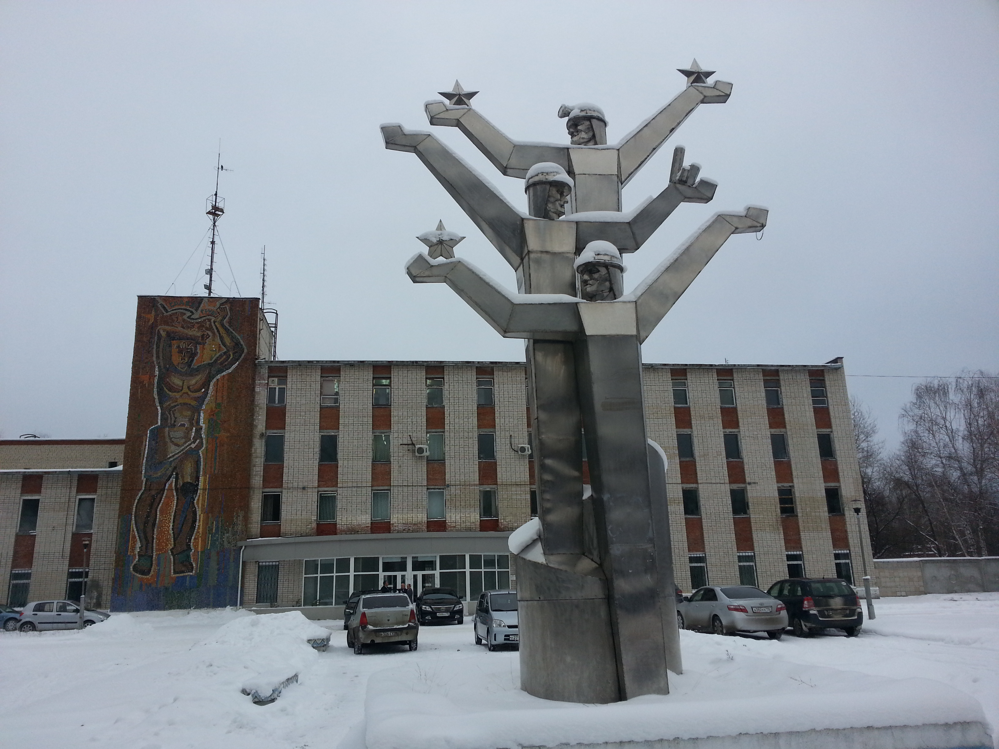 Проходная и управление ОП "Малышева" и памятник «Шахтерская слава». Памятник выполнен в 80-х годах по заказу управления Малышевского месторождения. Авторы: рабочие участка ремонтно-механической мастерской: слесарь Битюгин Григорий Николаевич и газоэлектросварщик Рошевский Степан. На руках у изображенных шахтеров 3 звезды. Это символ "Шахтерской славы" – наивысшей ведомственной награды, которая вручается достойному работнику на торжественных мероприятиях. Эта награда имеет три степени: I, II и III. Тот шахтер, у кого есть все три степени Шахтерской славы, считается полным кавалером орденов награды «Шахтерская слава».